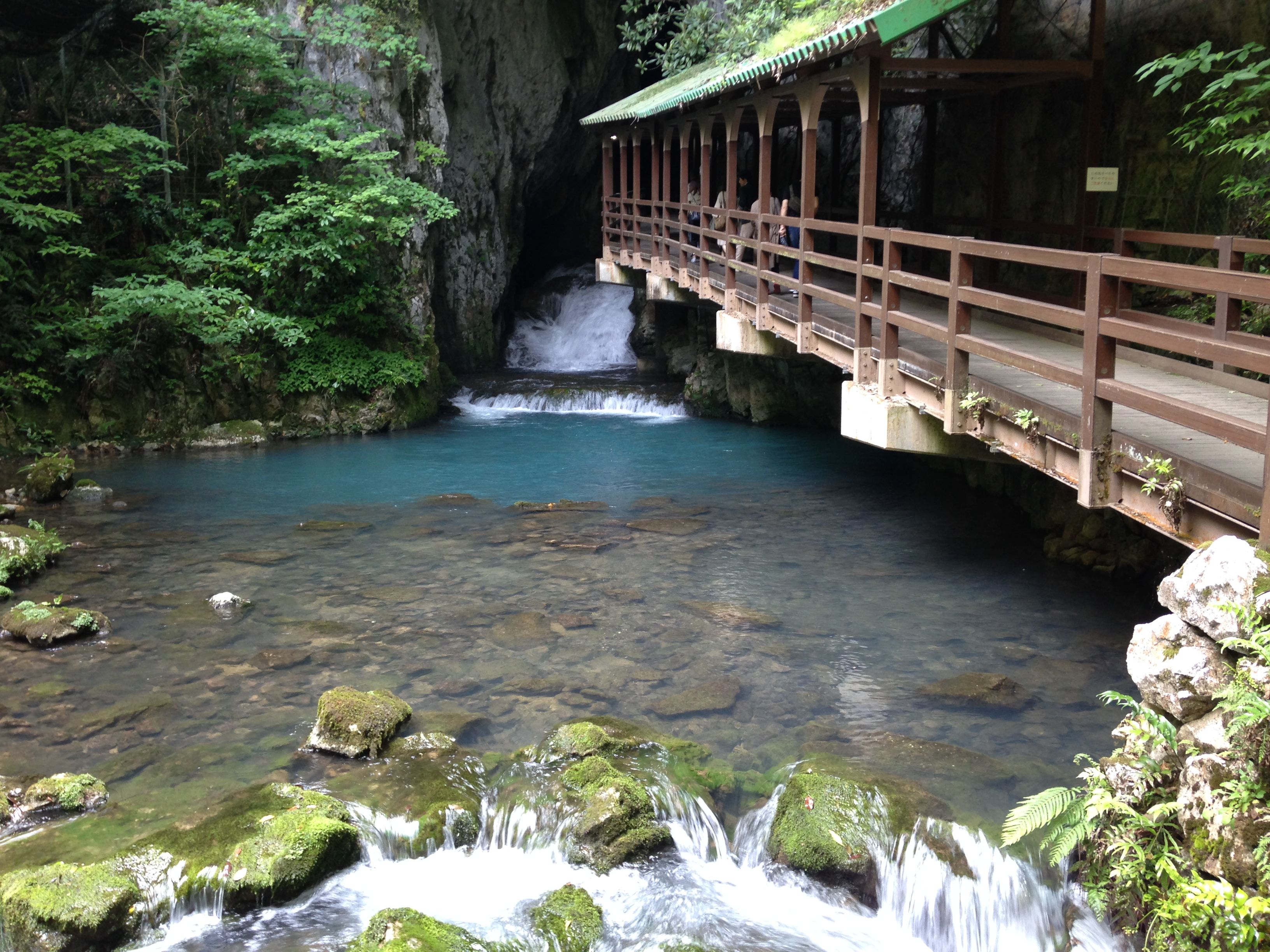 滝穴橋より望む稲川と秋芳洞の入り口